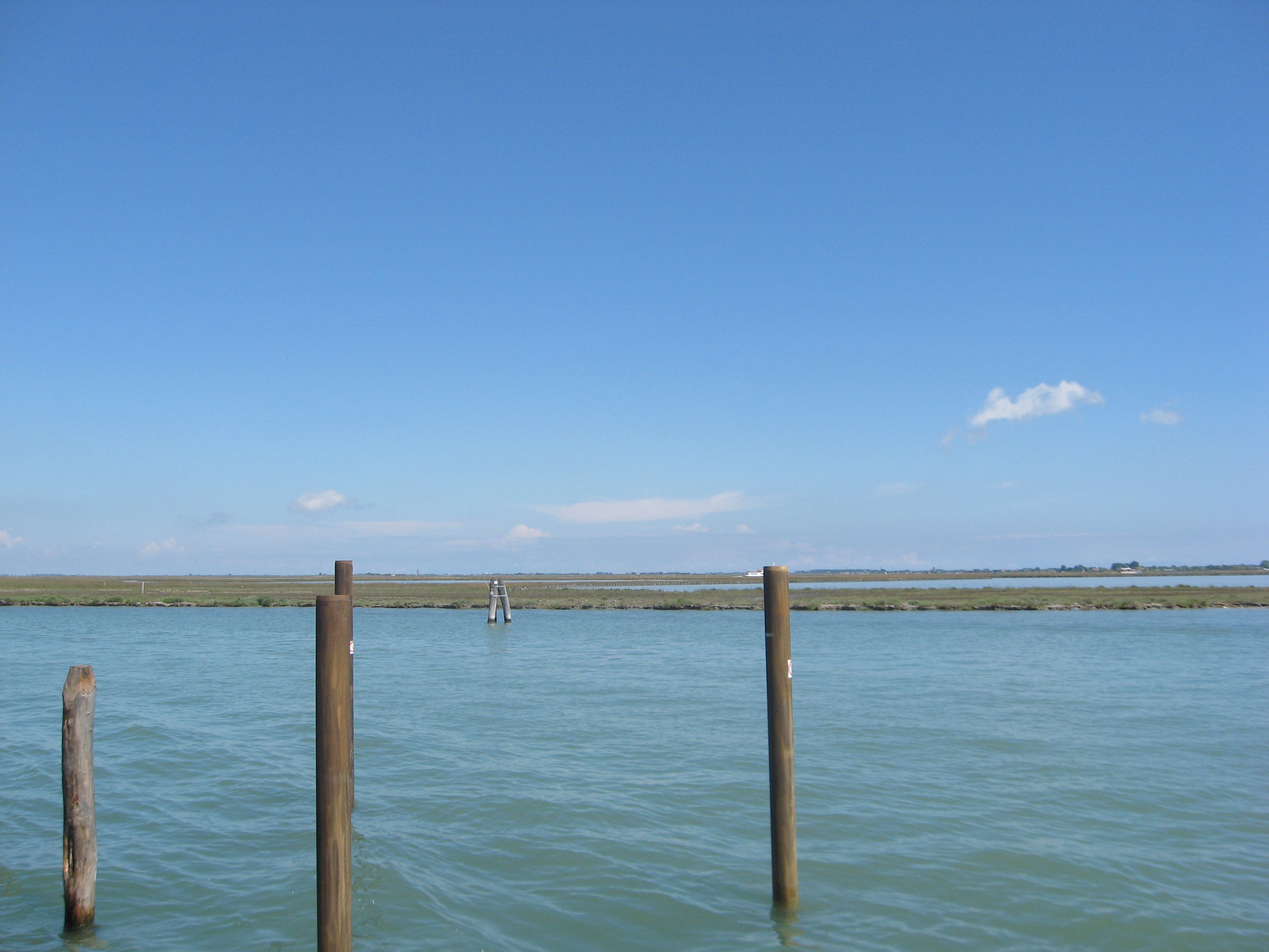 Massariol, laguna veneta ripresa dall'isola di Burano (VE)